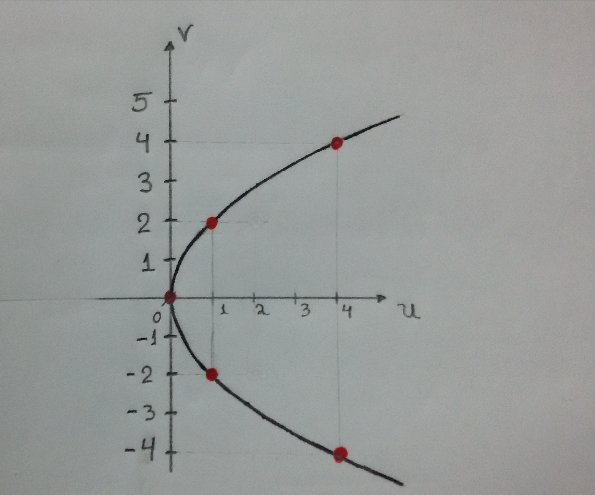 Gráfico qualquer usado de exemplo